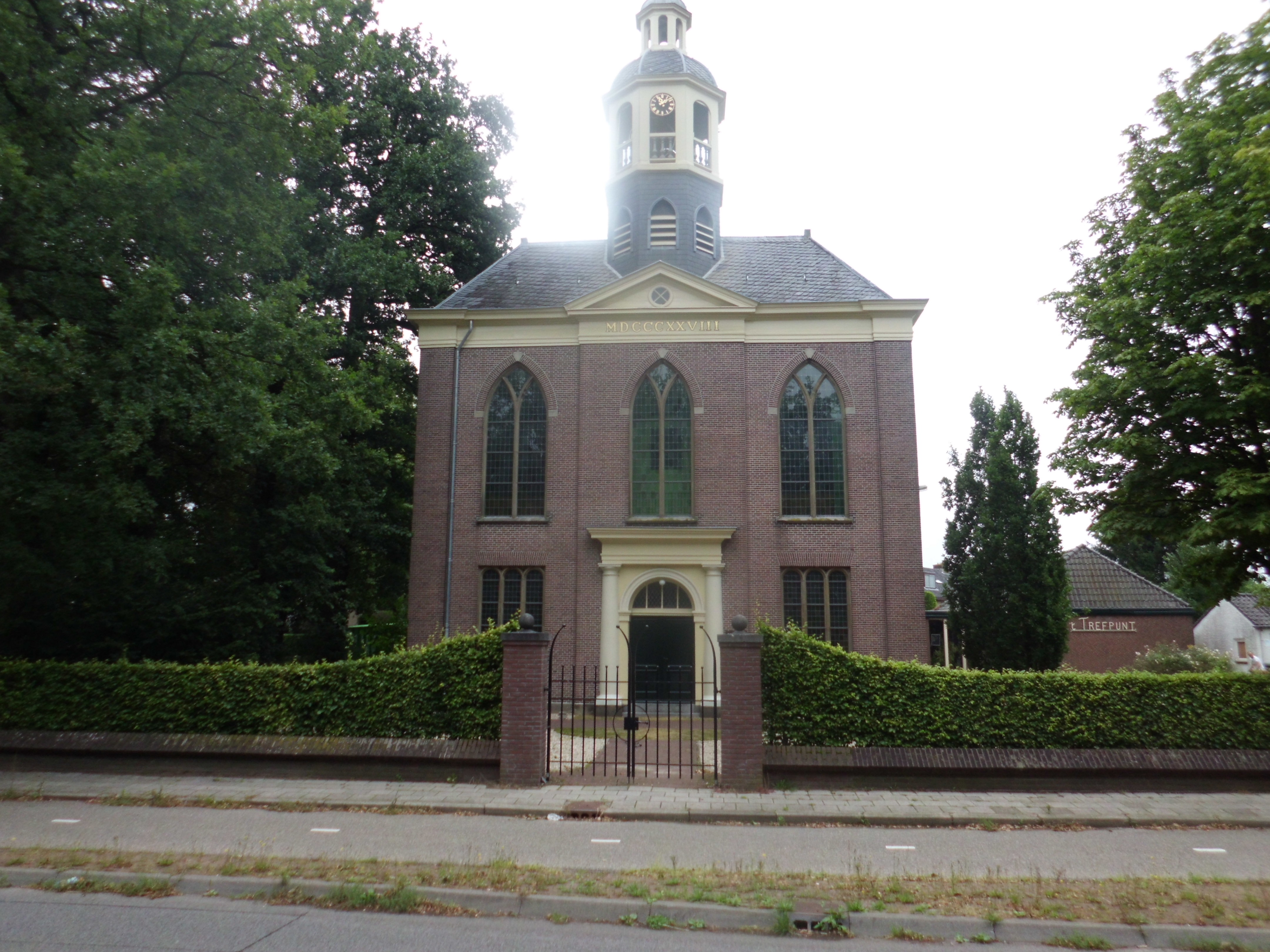 NH Kerk Arnhemseweg 75A Leusden-Zuid